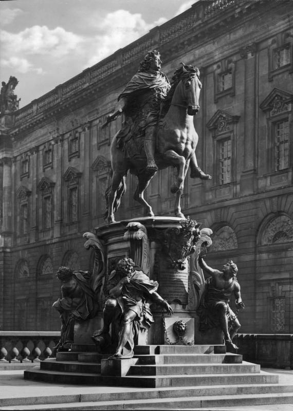 Berlin, Denkmal des Kurfürsten Friedrich Wilhelm von Brandenburg Scherl: Berlin 1938 Das von Schlüter entworfene Denkmal für den Kurfürsten Friedrich Wilhelm von Brandenburg (1964-88) steht auf der Kurfürstenbrücke (Rathausbrücke); im Hintergrund die Wasserfront des Marstalls.